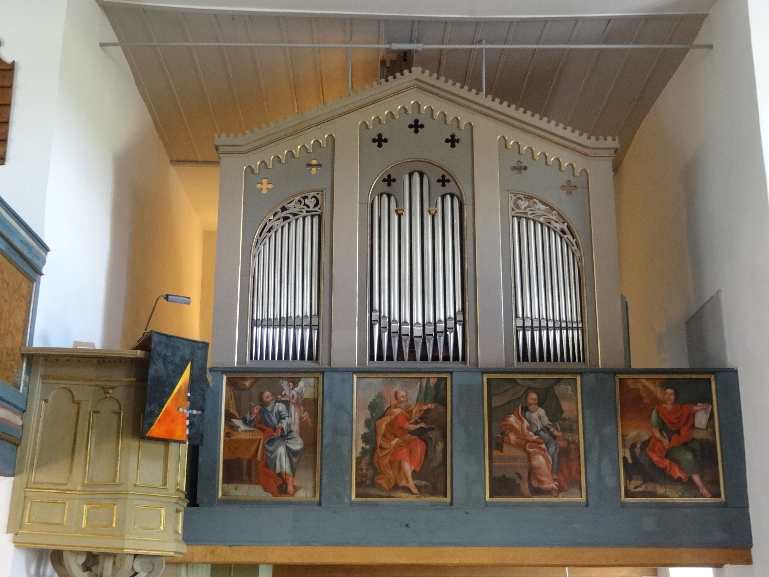 Evangelische Kirche Nonnenroth (Hungen)